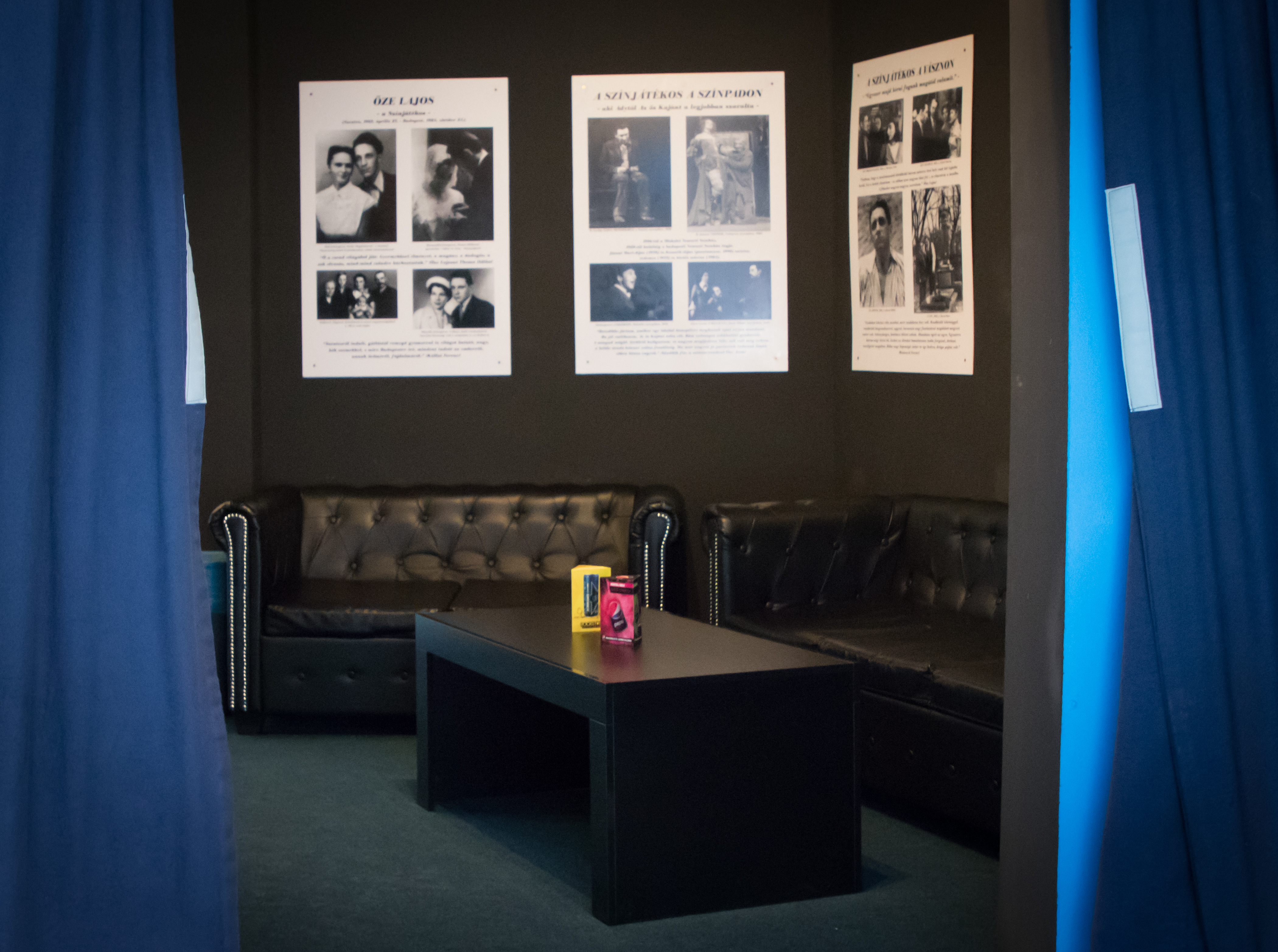 Őze Lajos emlékére berendezett mini kiállítás a moziban.